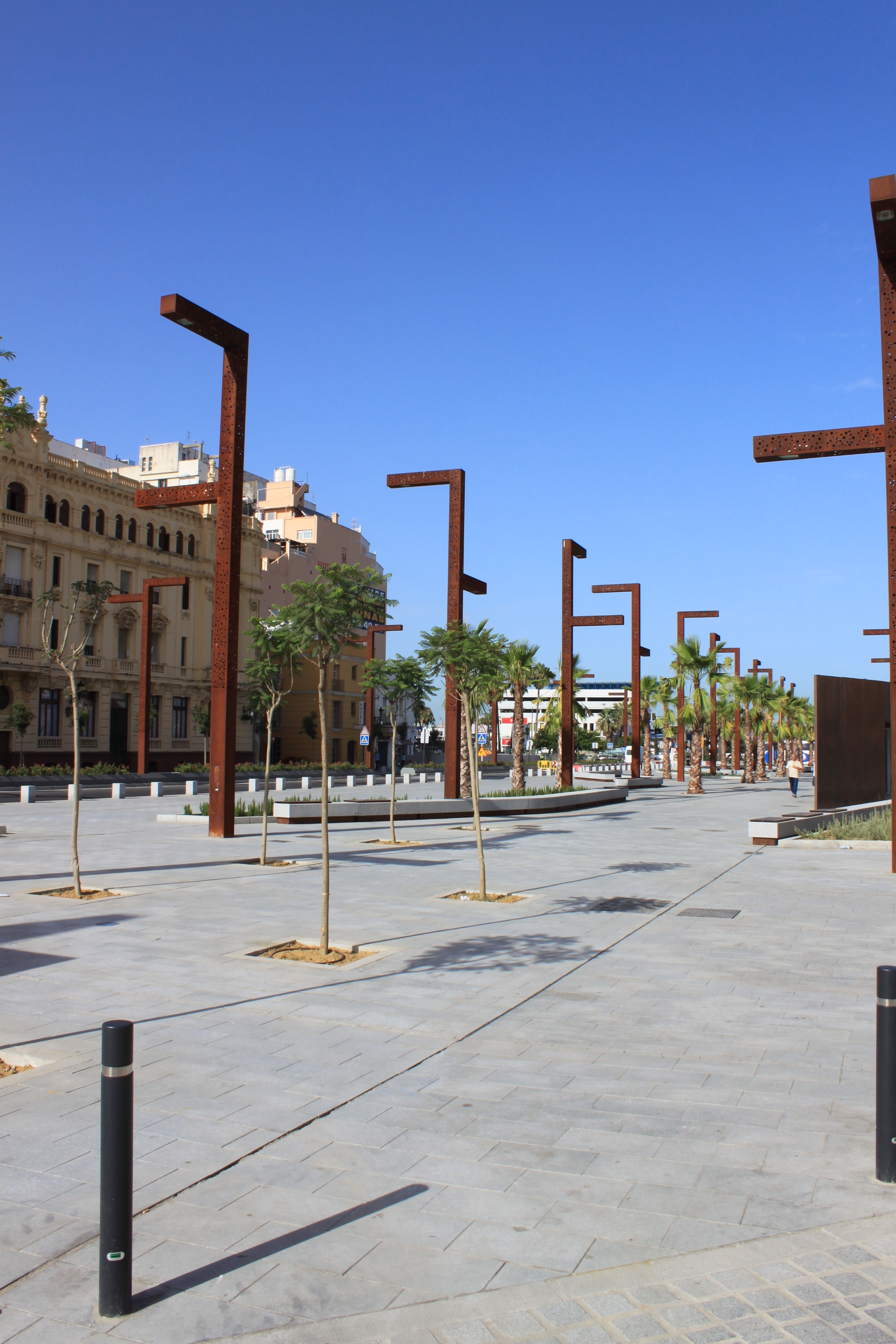 Paseo del Rio de la Miel en Algeciras, Andalucía, España.